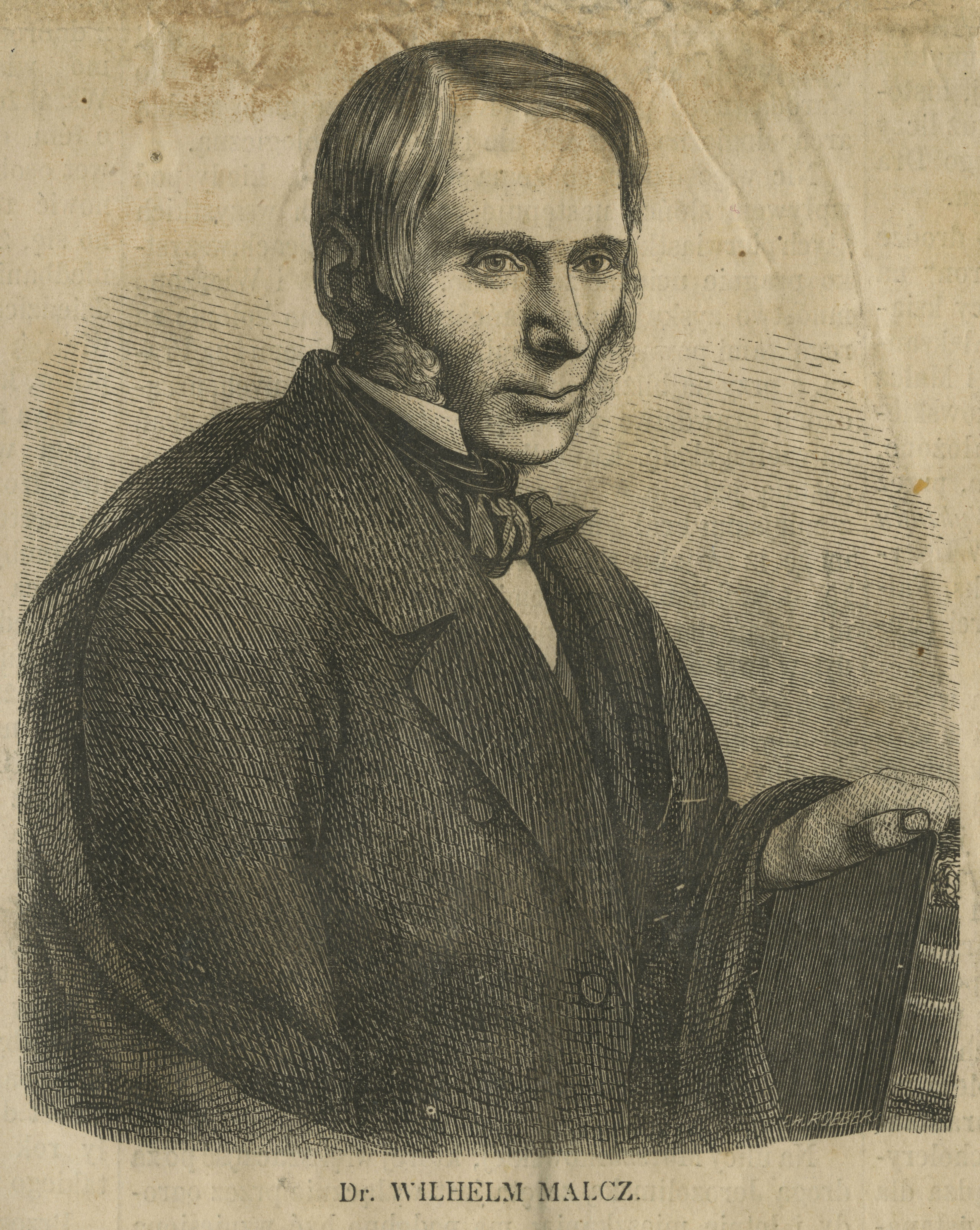 Dr. Wilhelm Malcz – polski lekarz, powstaniec listopadowy.